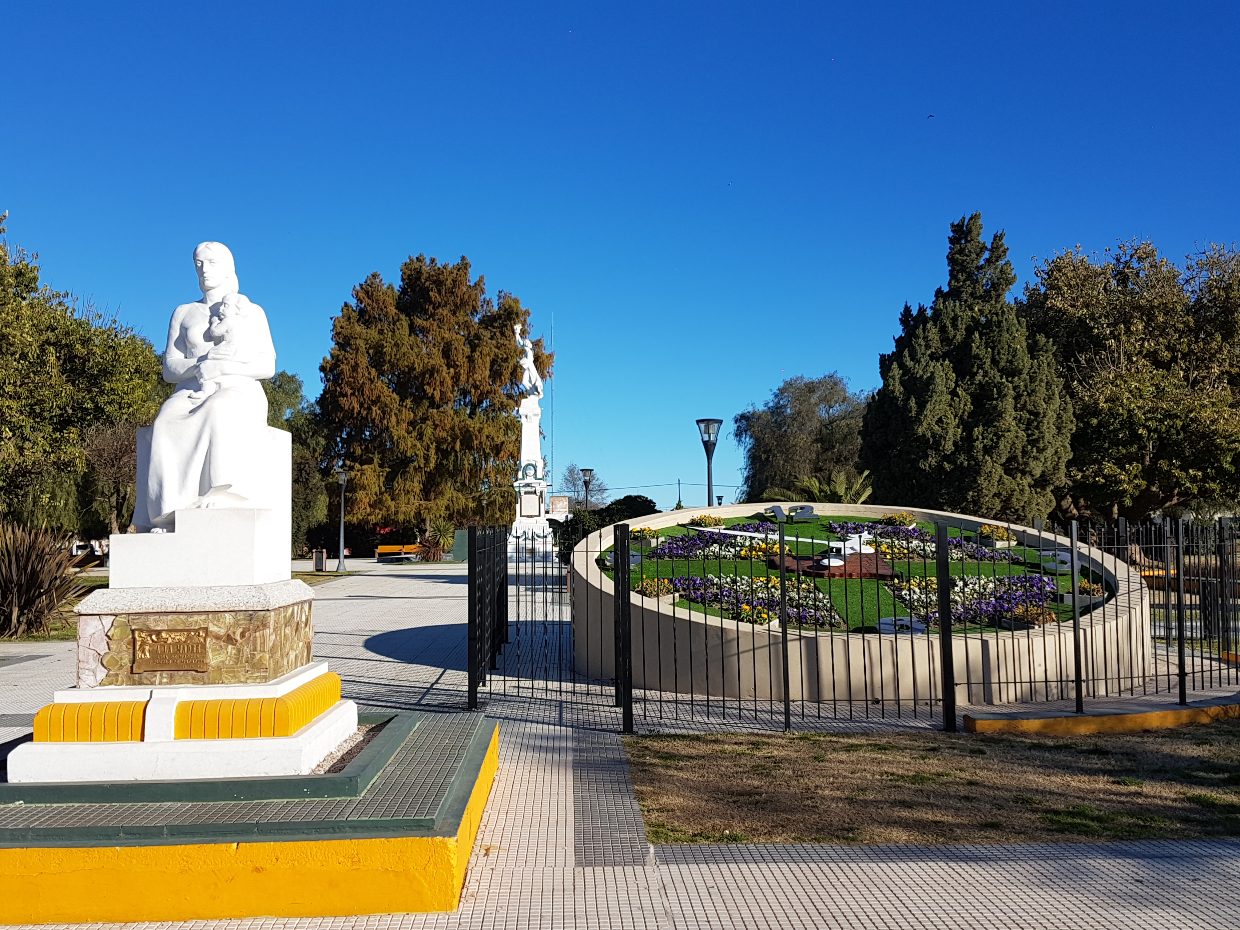 Plaza de Macachín